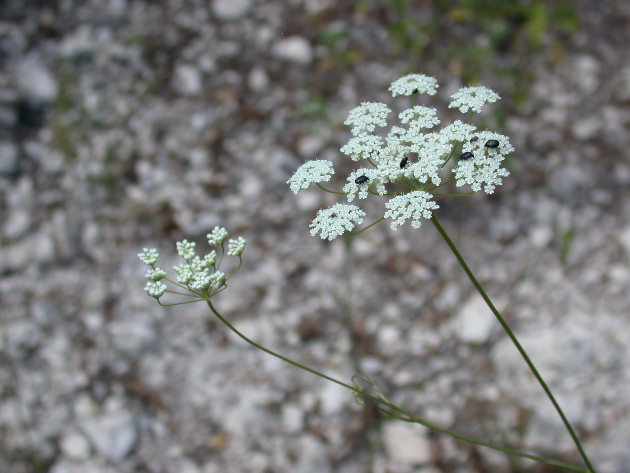 Pimpinella peregrina L. (כמנון קיפח), Mount Carmel, Israel, June 8, 2008.